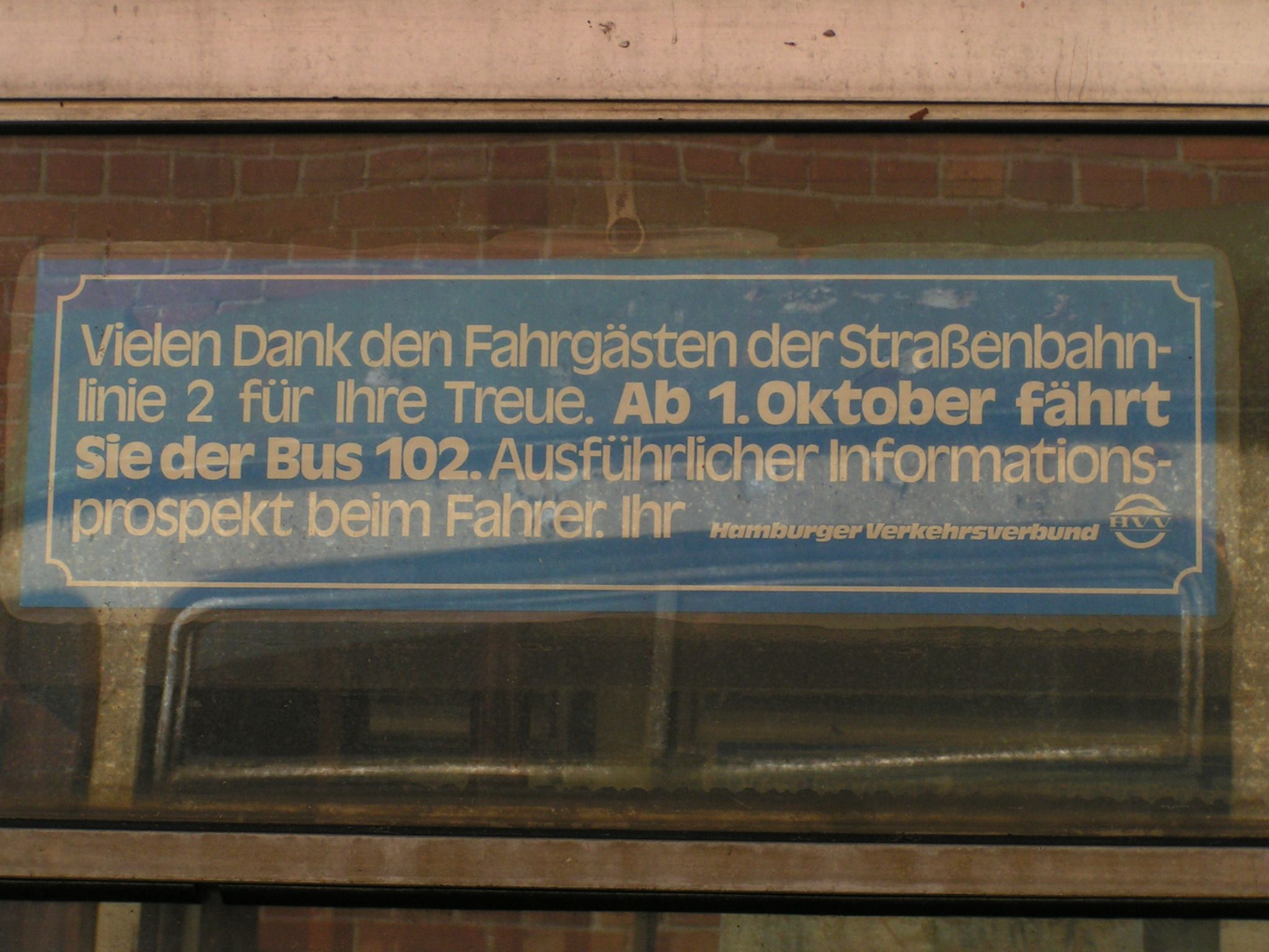 Historisches Hinweisschild zur Einstellung des Straßenbahnverkehrs in Hamburg; fotografiert im Hannoverschen Straßenbahnmuseum, Sehnde-Wehmingen